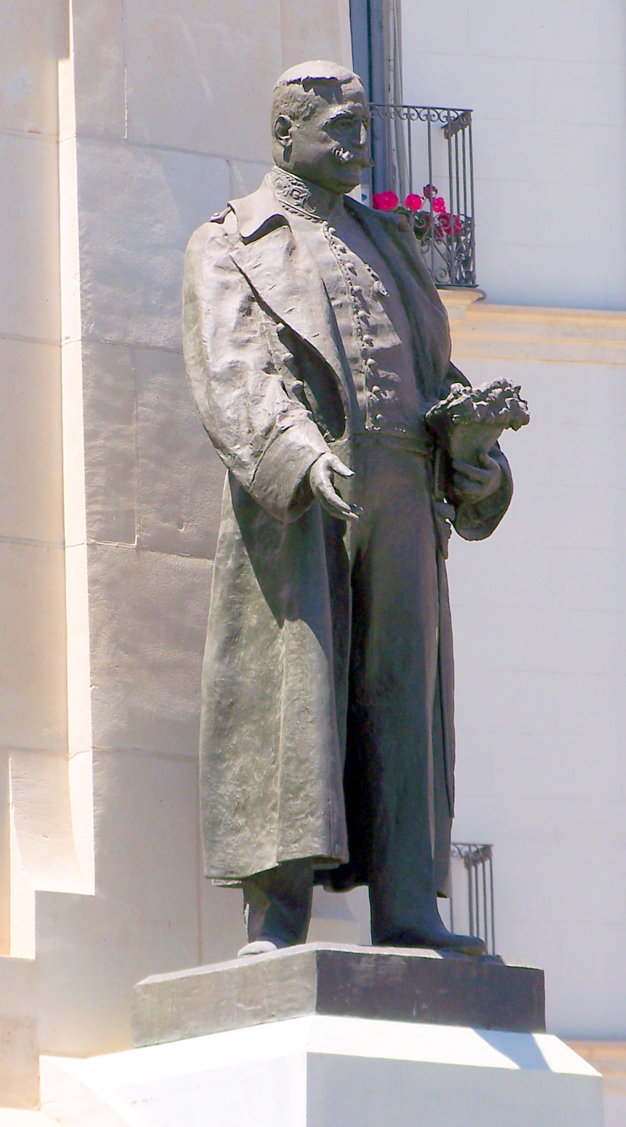 José Canalejas - Monumento a Canalejas, por Vicente Bañuls Aracil (1916) - Alicante.